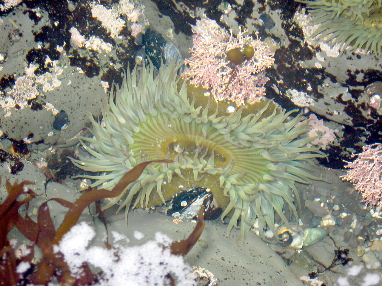 Fitzgerald Marine Reserve tidepool